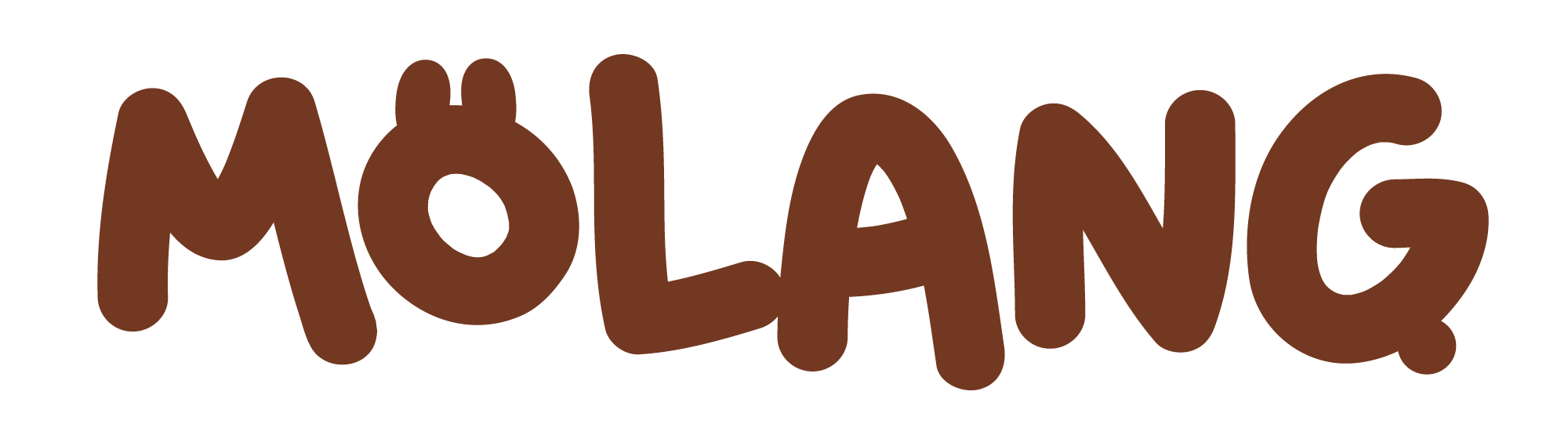 Logo Mölang